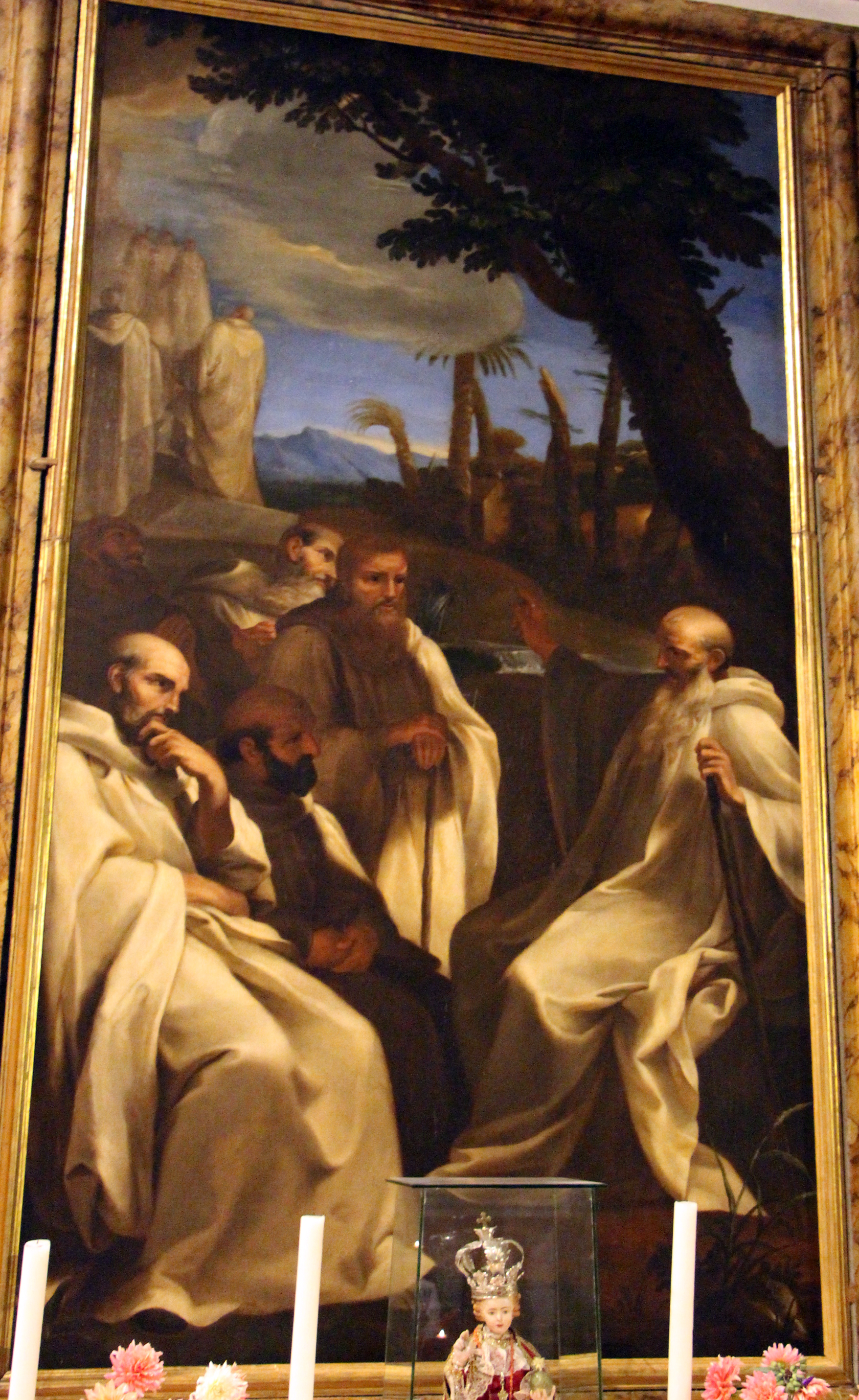 Der Heilige umgeben von seinen Ordensbrüdern